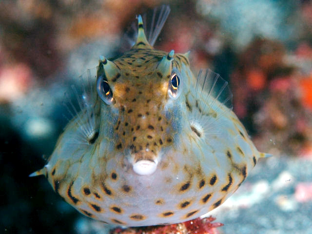 ウミスズメ Lactoria diaphana